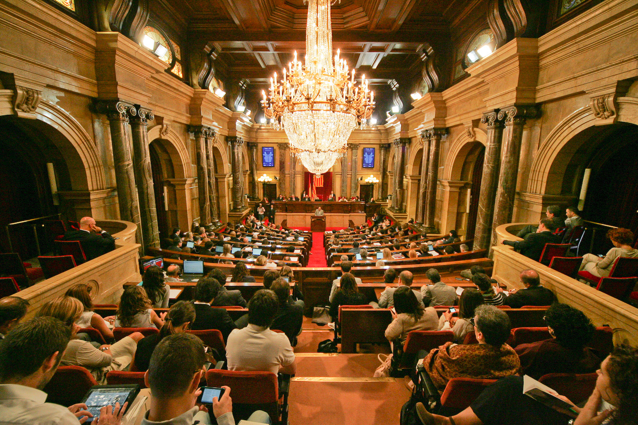 Foto: Parlament de Catalunya (Job Vermeulen).